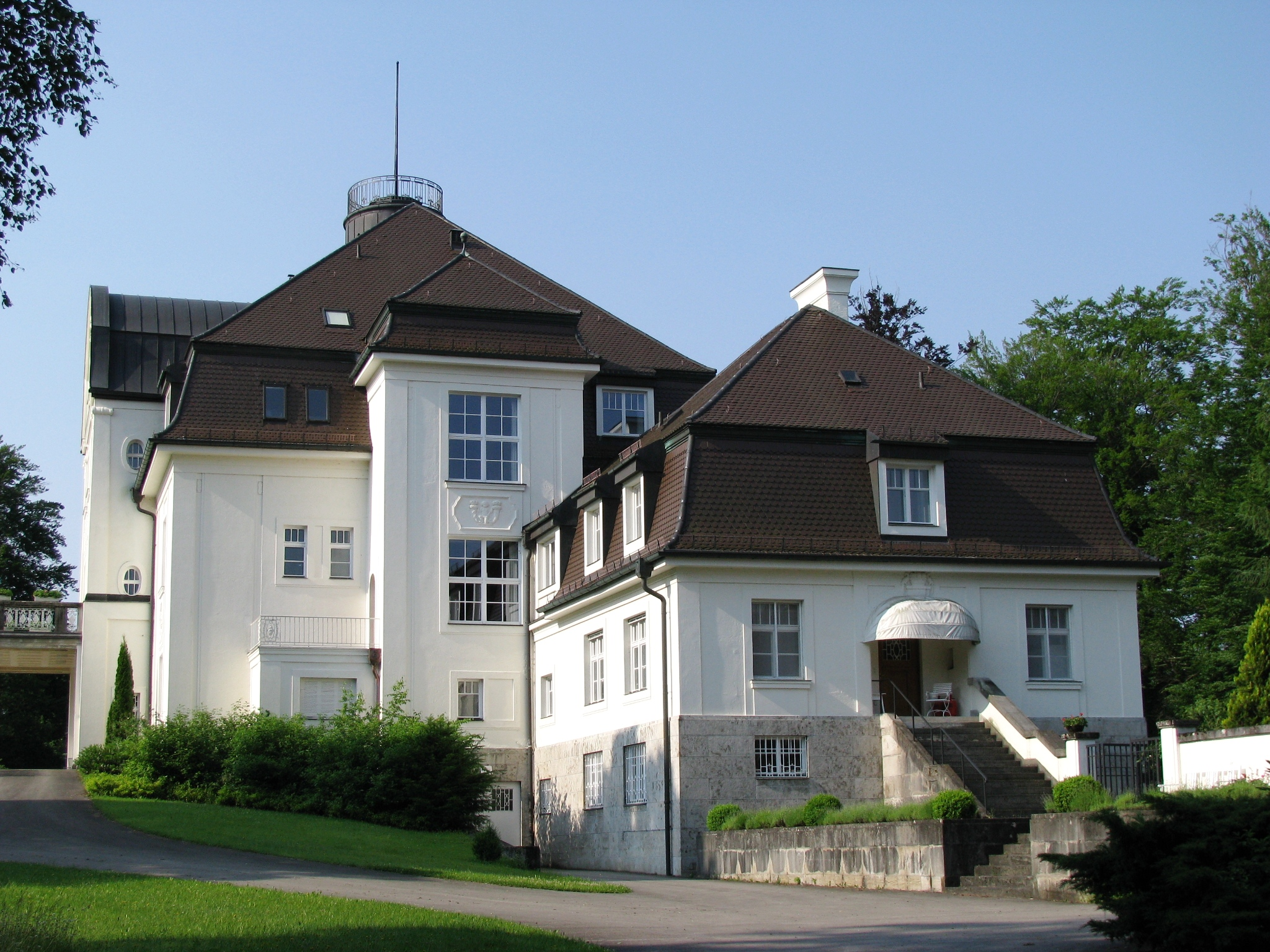 Schloss Weidenkam; Ansicht von Norden durch das Eingangstor